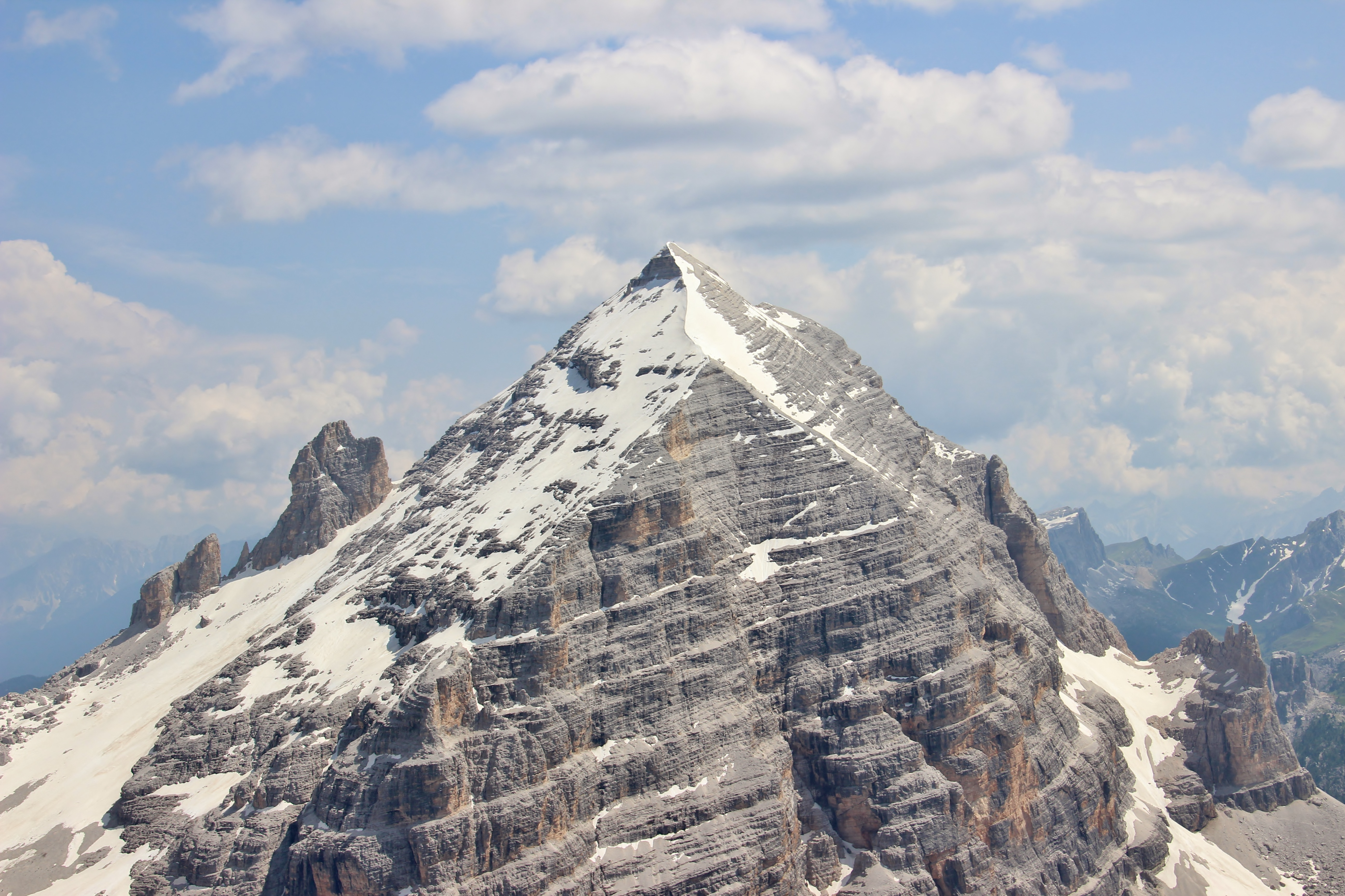 Tofana di Rozes (3225 Meter)